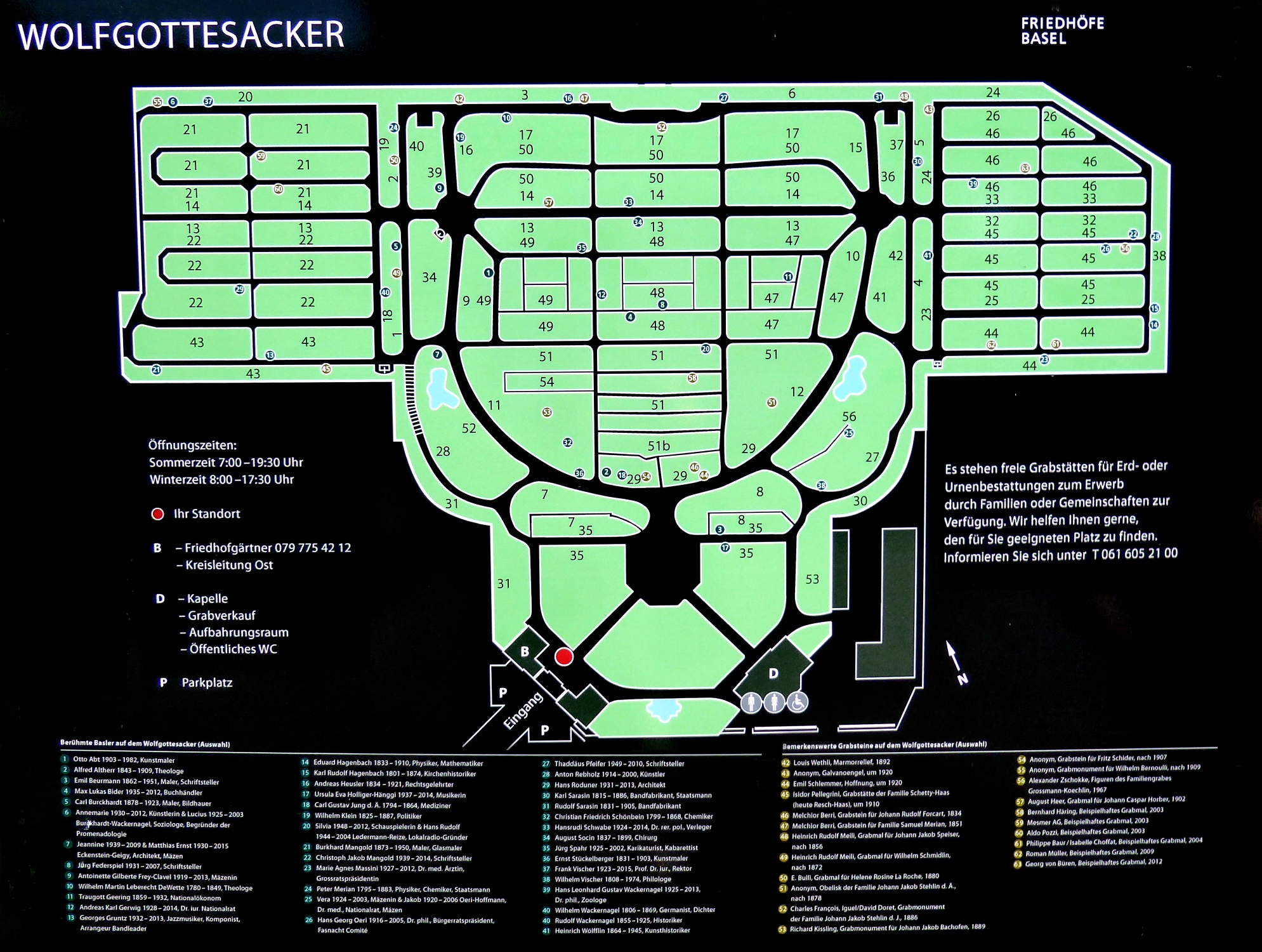 Informationstafel der Grabstätten von bedeutenden Persönlichkeiten